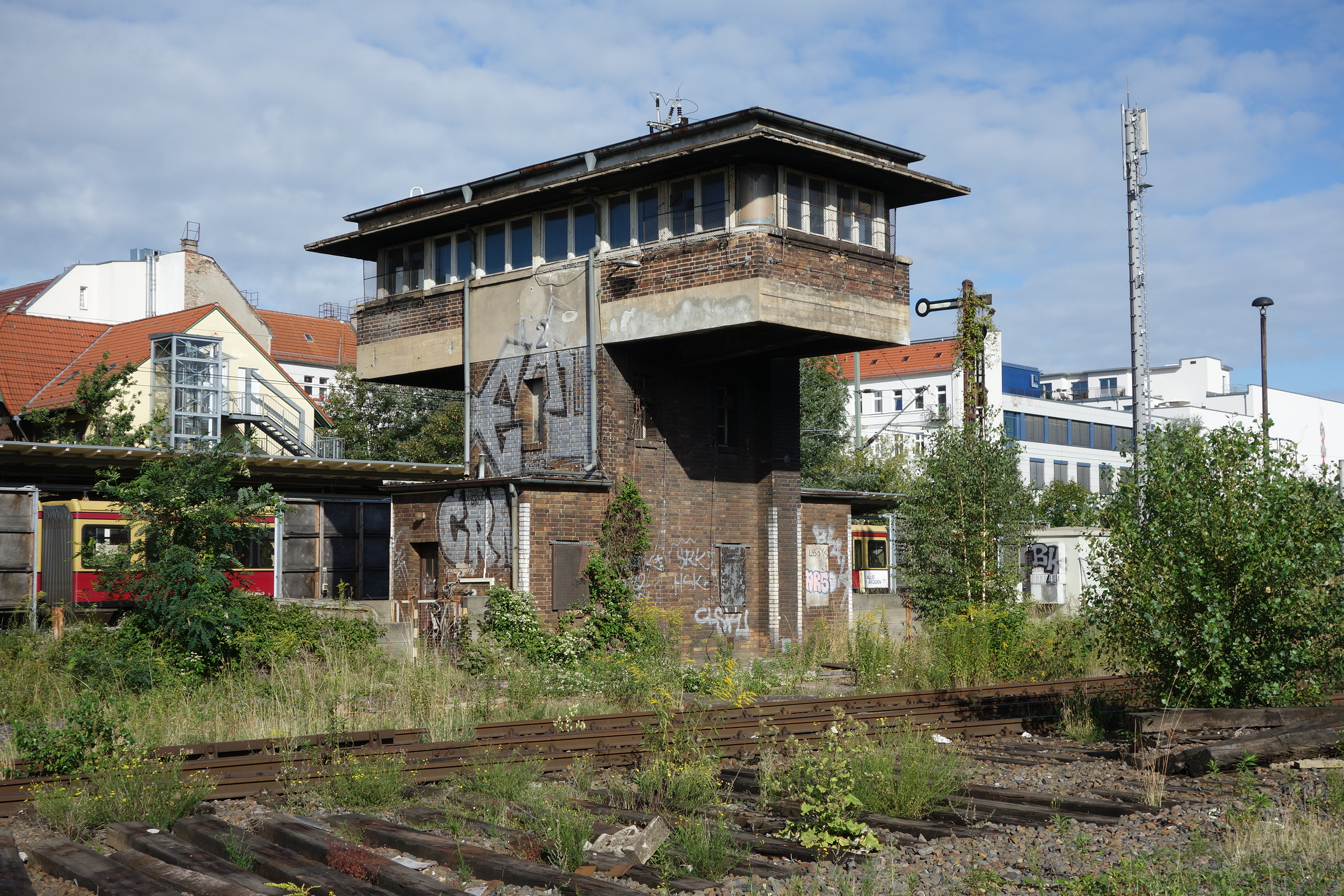 Bahnhof Berlin Frankfurter Allee, Stellwerk B2